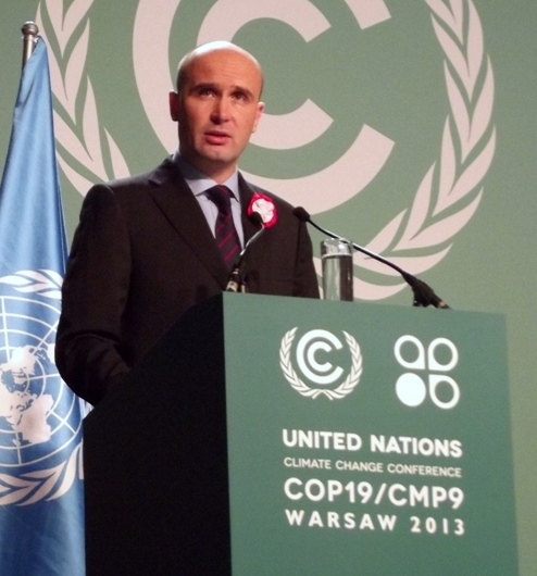 Zdjęcie zrobione podczas 19. Ramowej Konwencji Narodów Zjednoczonych ds. Zmian Klimatu (COP19) w Warszawie.